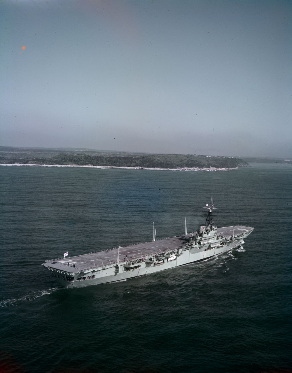 HMCS Magnificent from air stbd side June 1954.